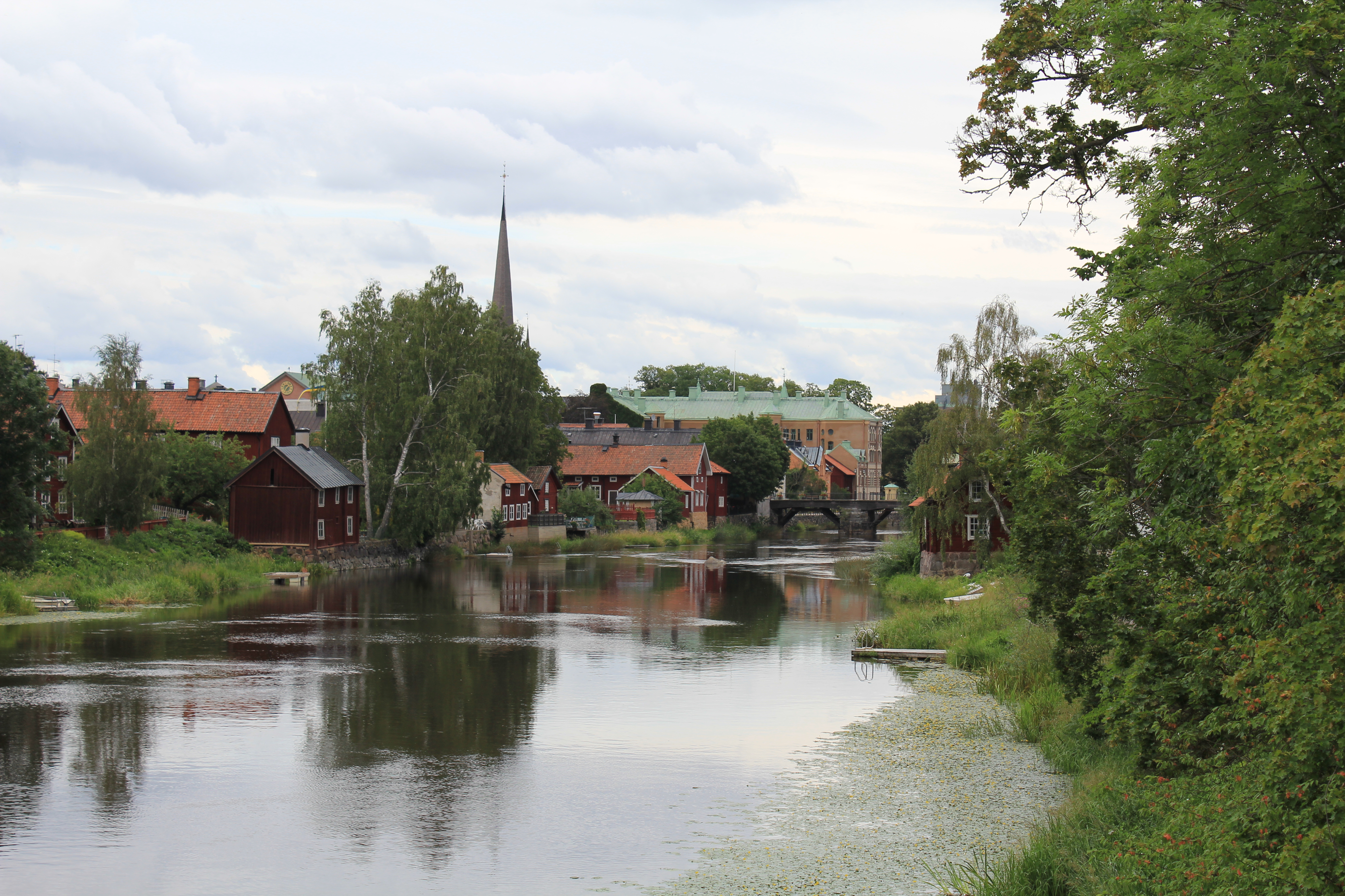 Arboga. Bild tagen från Strömsnäsbron.